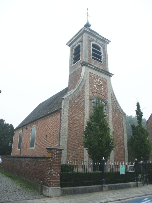 Sint-Michielkerk van Beisem (Veltem-Beisem)(België)